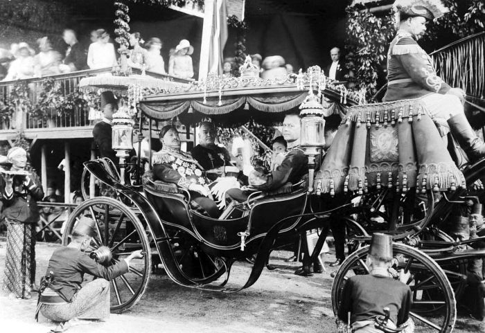 Repronegatief. In de 17e eeuw werd Java beheerst door twee rijken, namelijk het sultanaat Bantam in het westen en Mataram in het midden en oosten. Bantam was al vroeg in de 19e eeuw een normale Gouvernements Residentie (een soort provincie) geworden. Mataram was in de loop der tijd steeds meer gebied kwijt geraakt. Na afloop van de Java Oorlog, in 1830, resteerden van dat rijk alleen de zogeheten Vorstenlanden, in het zuidelijk deel van Midden-Java, voornamelijk bestaand uit Soerakarta (ook Solo genoemd) en Jogjakarta (Jogja). De vorsten van deze twee gebieden (respectievelijk de Susuhunan en de Sultan) waren officieel zelfstandig maar hadden in feite weinig speelruimte. (P. Boomgaard, 2001). Het veertig-jarig regeringsjubileum van Soesoehoenan Pakoe Boewono X van Surakarta, hier met legercommandant Cramer in de gouden koets tijdens de inspectie van de troepen 40-jarig regeringsjubileum van Susuhunan Pakoe Boewono X van Soekarto, Midden-Java, 1933